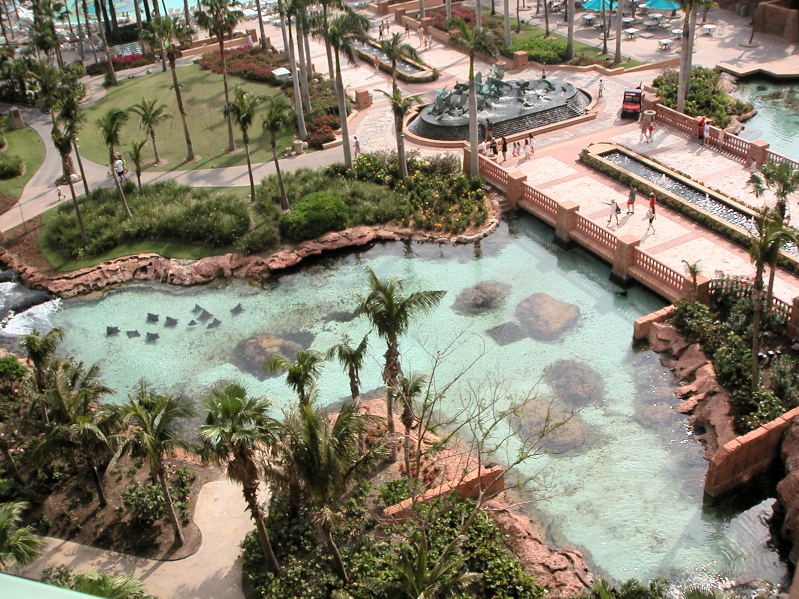 Atlantis, Paradise Island, Nassau, Bahamas.